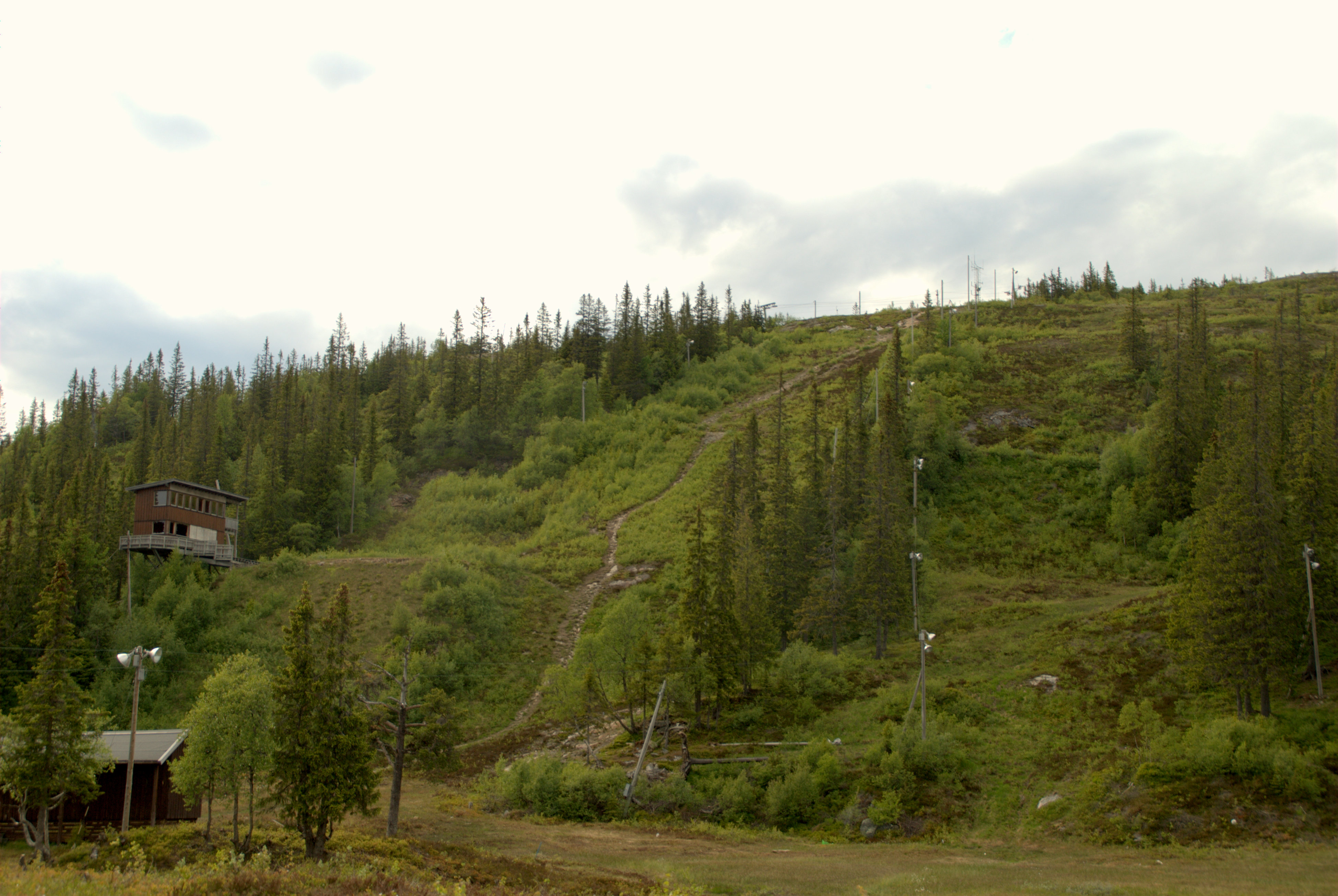 Gråkallen skisenter/Gråkallbakken i Bymarka i Trondheim.